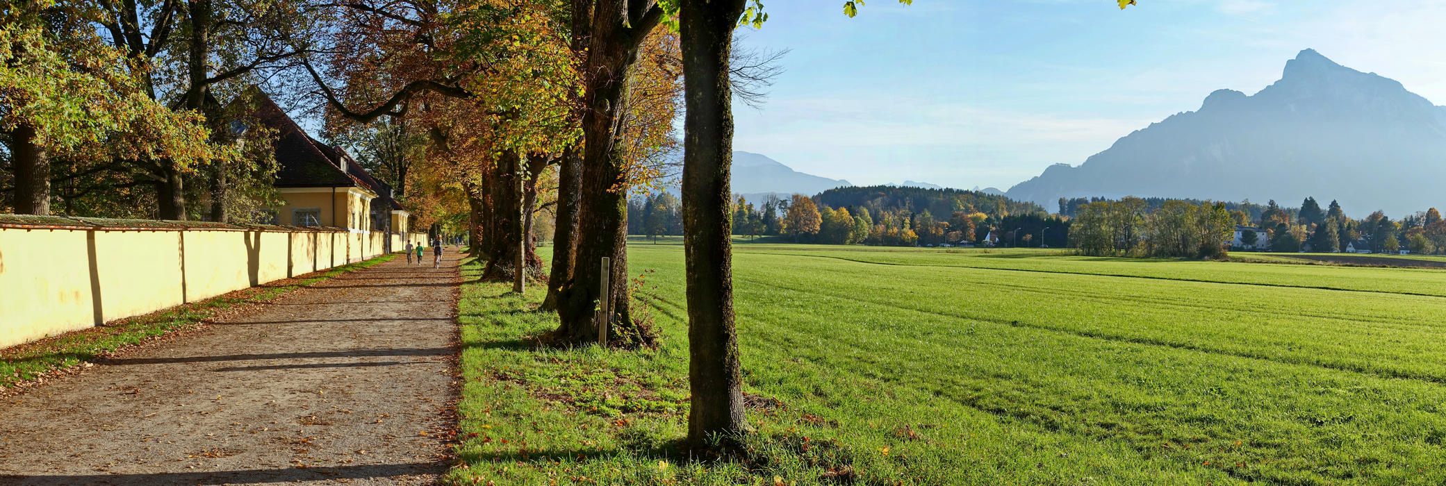 Salzburg, abendliche Hellbrunner Allee im Herbst mit Untersberg